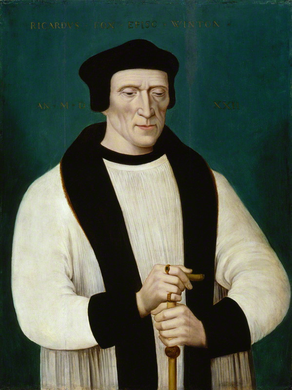 Richard Fox (1446/1448–1528) englischer Humanist, Staatsmann und Prälat